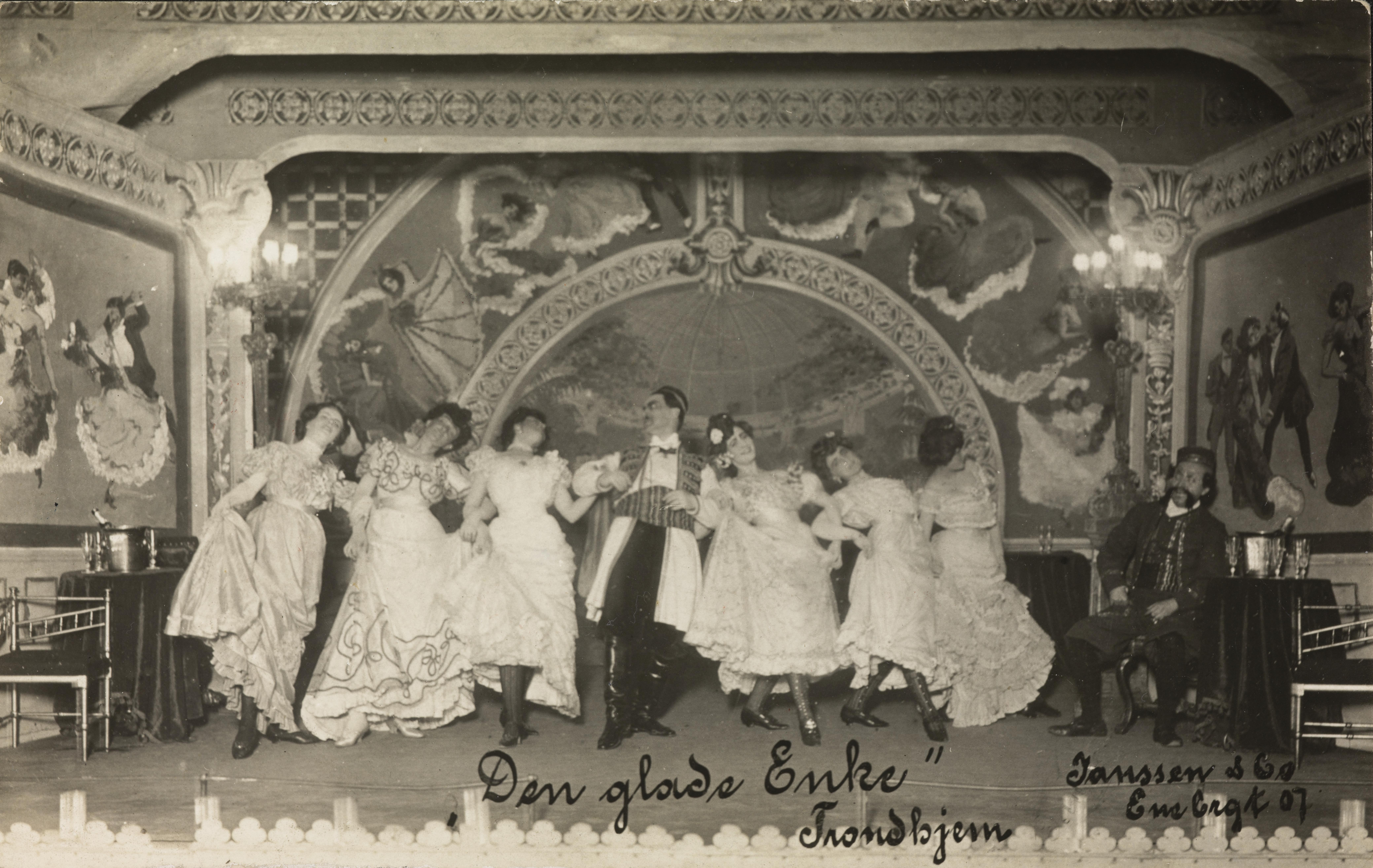 Bildet er hentet fra Nasjonalbibliotekets bildesamling